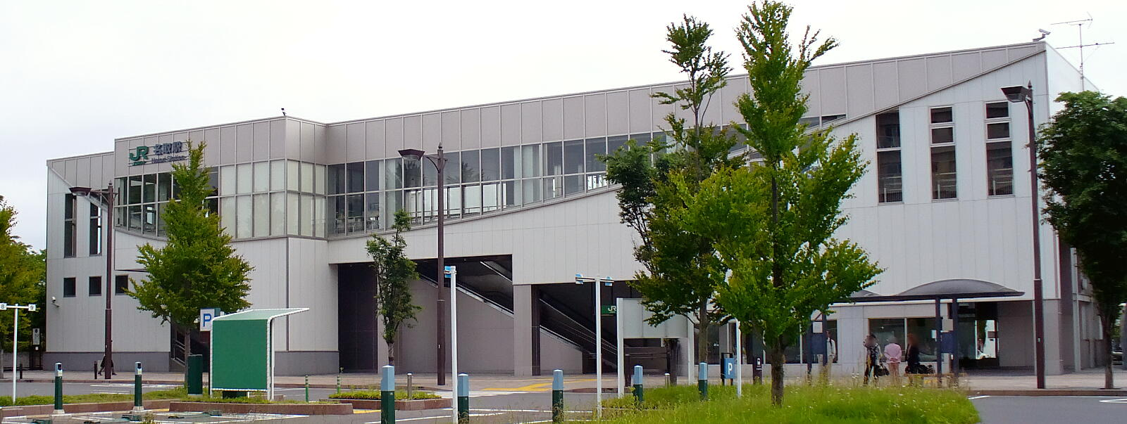 名取駅（西口）